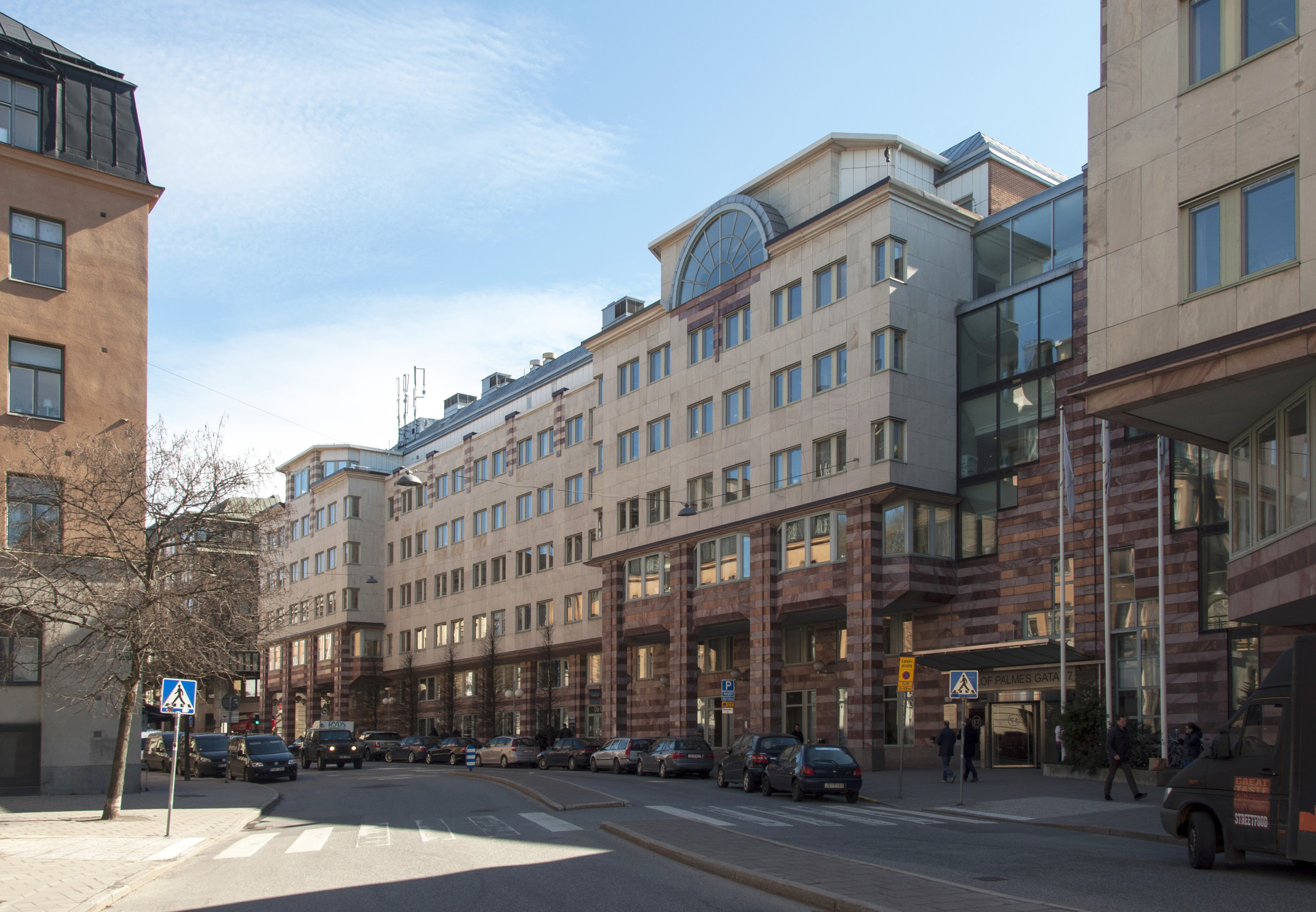 Apeln 8, Olof Palmes gata 15-17, Nybyggnadsår 1983 - 1986, Cepro Konsulter AB (Arkitektkontor) FFNS Arkitekter i Stockholm (Arkitektkontor) SIAB Stockholmsförvaltningen Avdelningen för Hus och Industri (Byggmästare) Svenska Industritjänstemannaförbundet (Byggherre) Tyréns Företagsgrupp AB (Konstruktör)